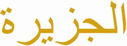 aljazeera en arabe